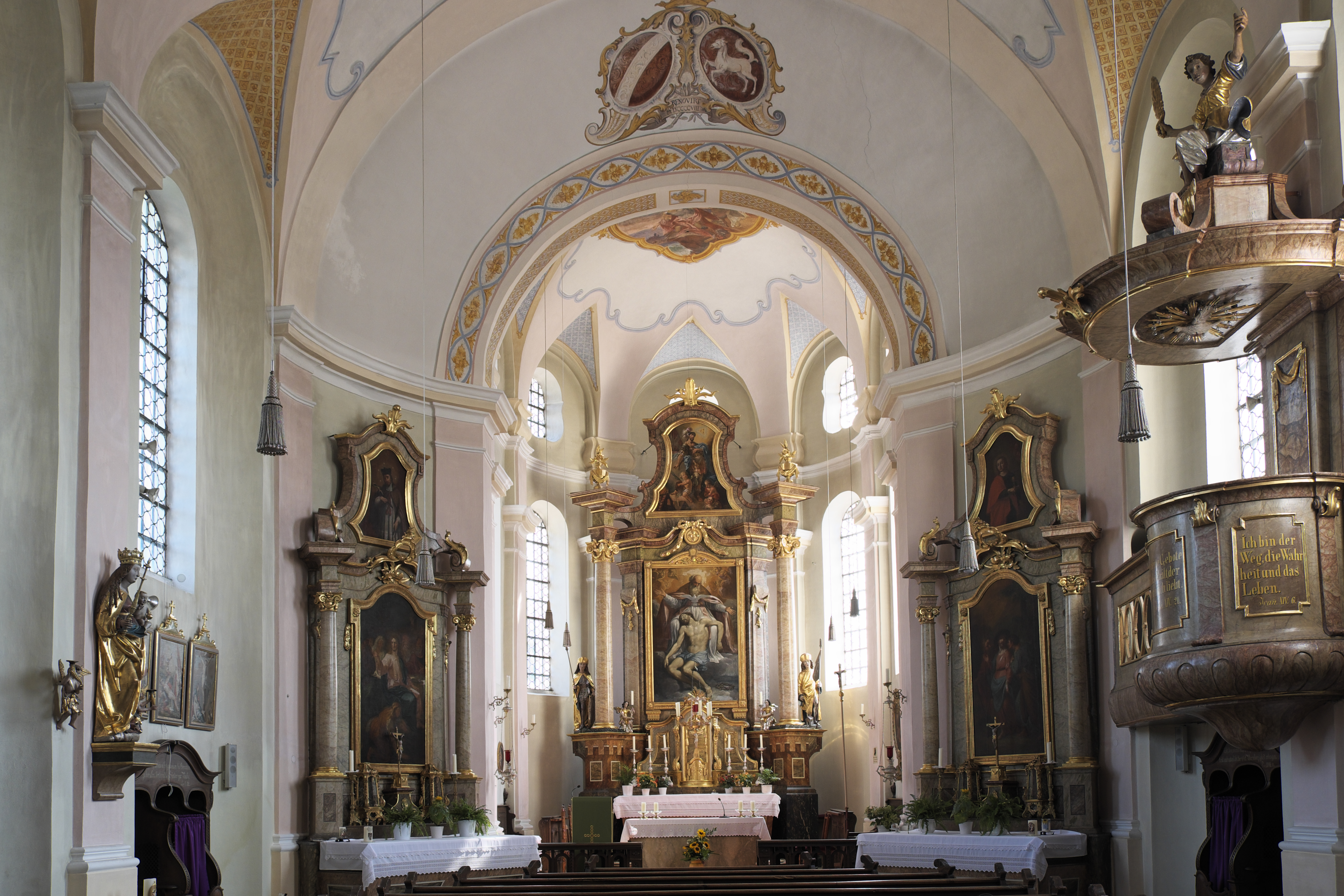 Katholische Pfarrkirche St. Florian in Fraunberg im Landkreis Erding (Bayern/Deutschland), Innenraum